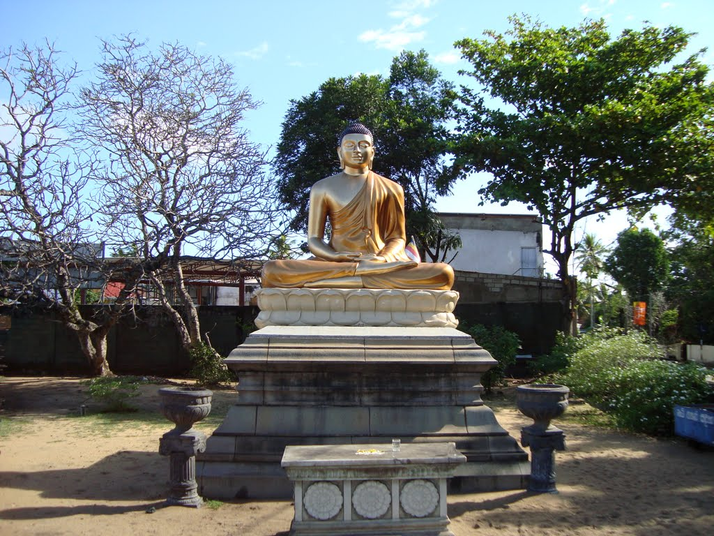 සිංහල: සමාධි බුද්ධ ප්‍රතිමා වහන්සේ.